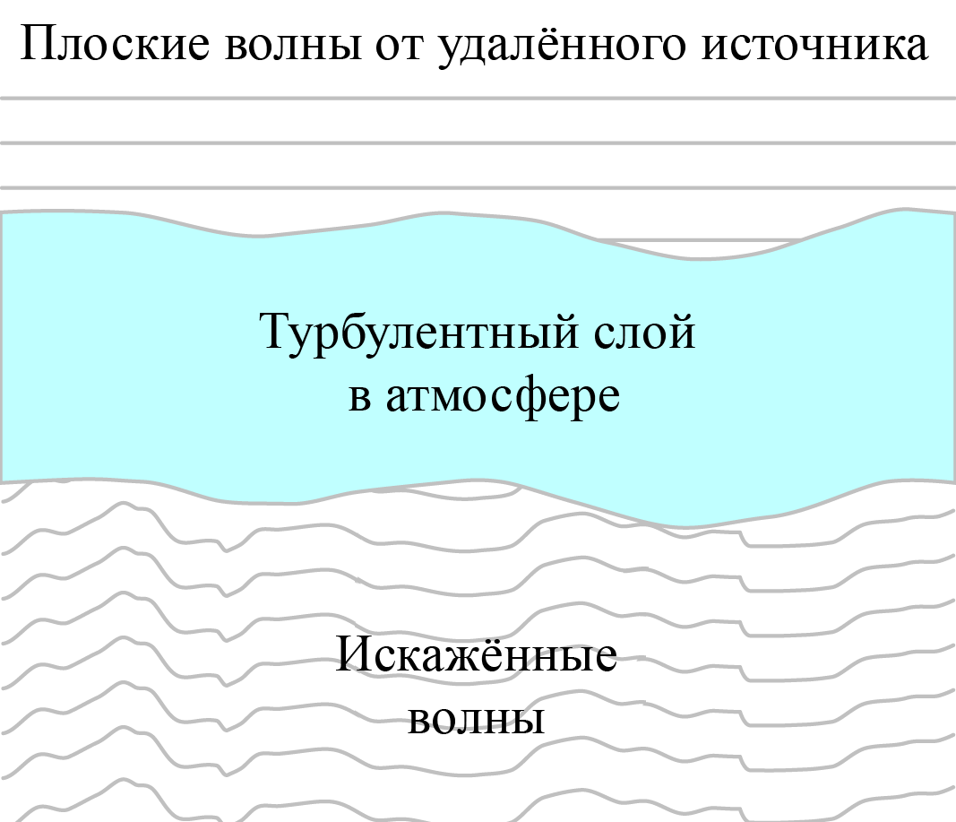 Схема искажения плоских волн в атмосфере